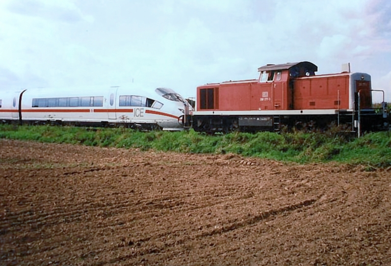 Überführung eines ICE im Feld bei Arsbeck/Wildenrath